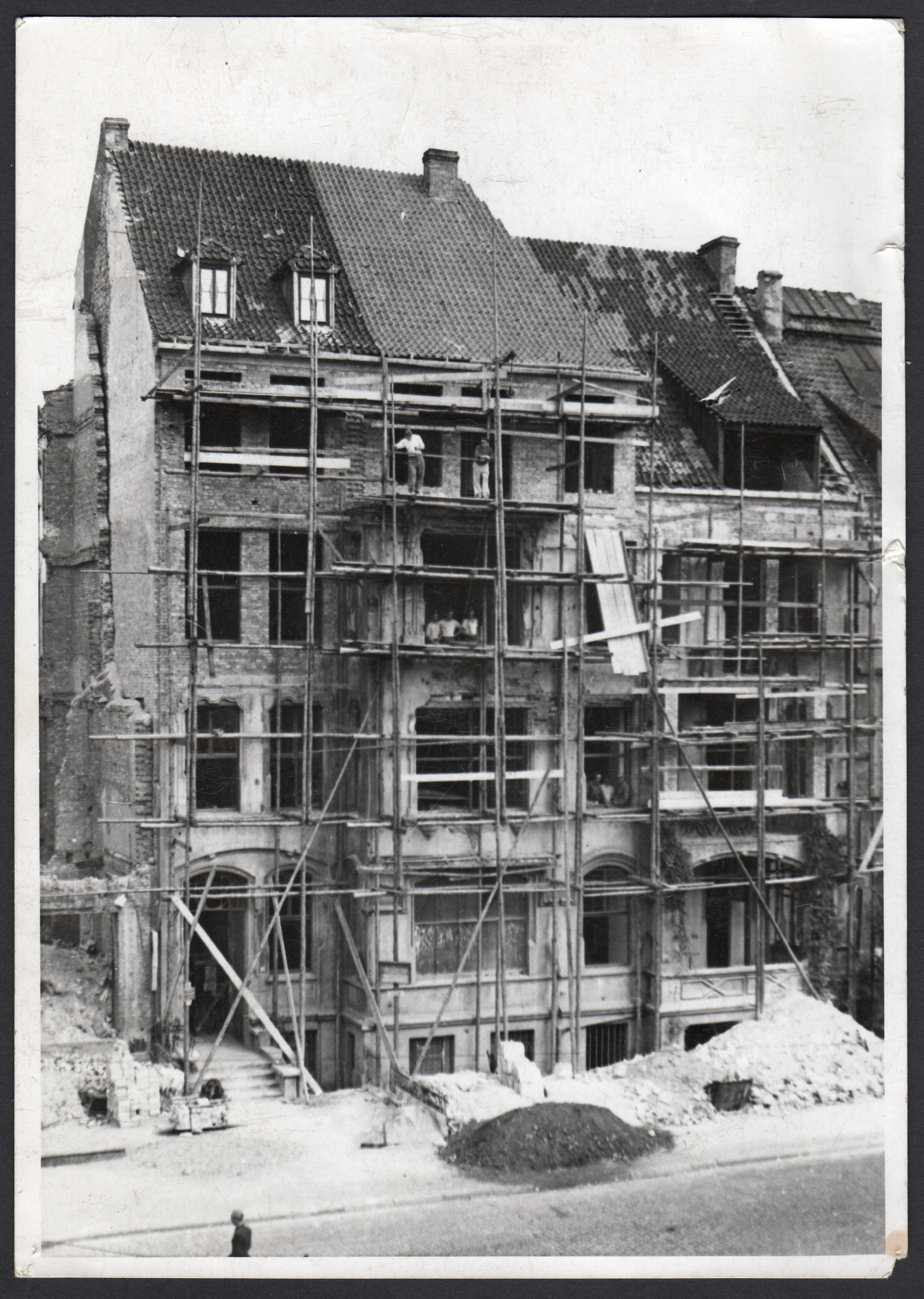 September 1947: Wiederaufbau des während der Luftangriffe auf Hannover im Zweiten Weltkrieg durch Fliegerbomben teilzerstörten Gebäudes Oskar-Winter-Straße 9 am Lister Platz in Hannover. Foto von Edmund Lill (Rechteinhaberin: Shahnaz Taheri von der Firma Photo Lill). Zu sehen sind die Bauarbeiter hinter dem hölzernen Baugerüst ...